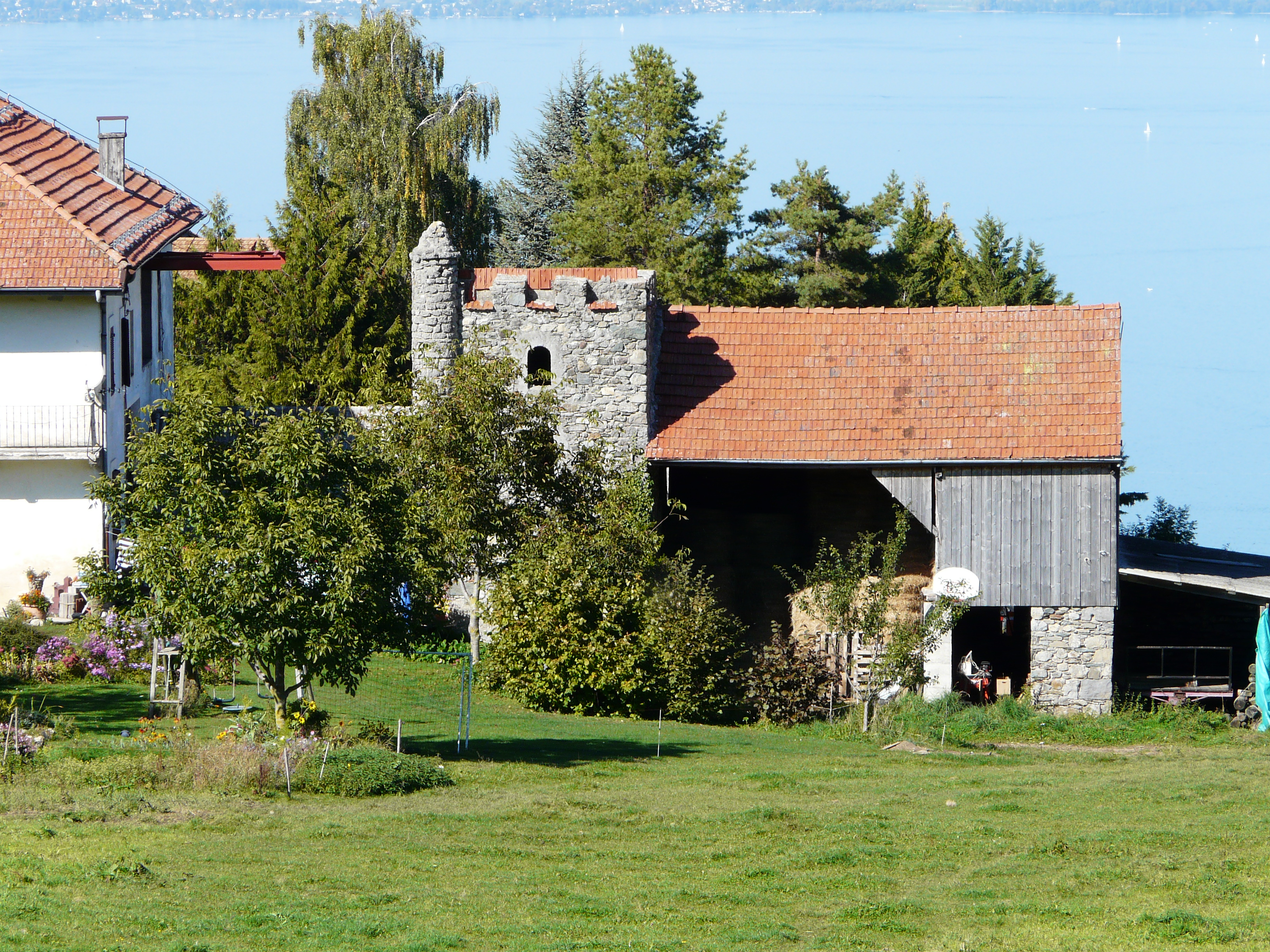 Château-Vieux, Saint-Paul en Chablais (F 74)